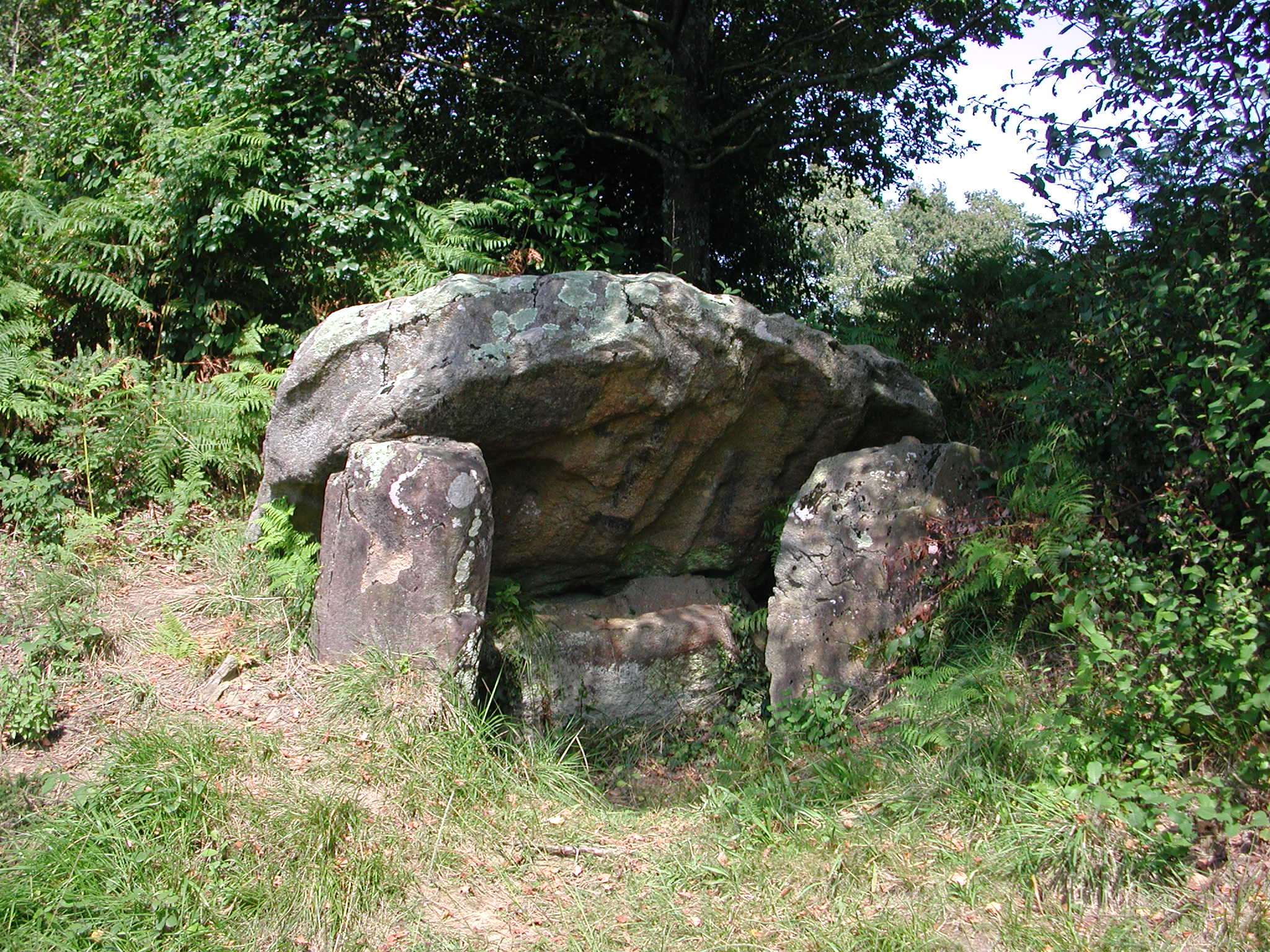 Dolmen de Peyre Dusets au bord du Chemin Henri IV, Loubajac, Hautes-Pyrénées, France